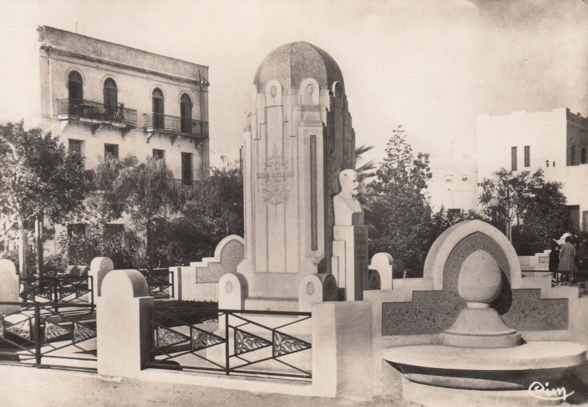 Statut de Paul Bourde à Sfax